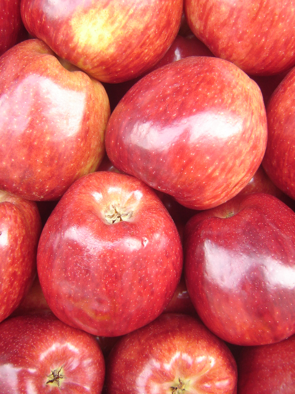 Photo taken in Buenos Aires, Argentina